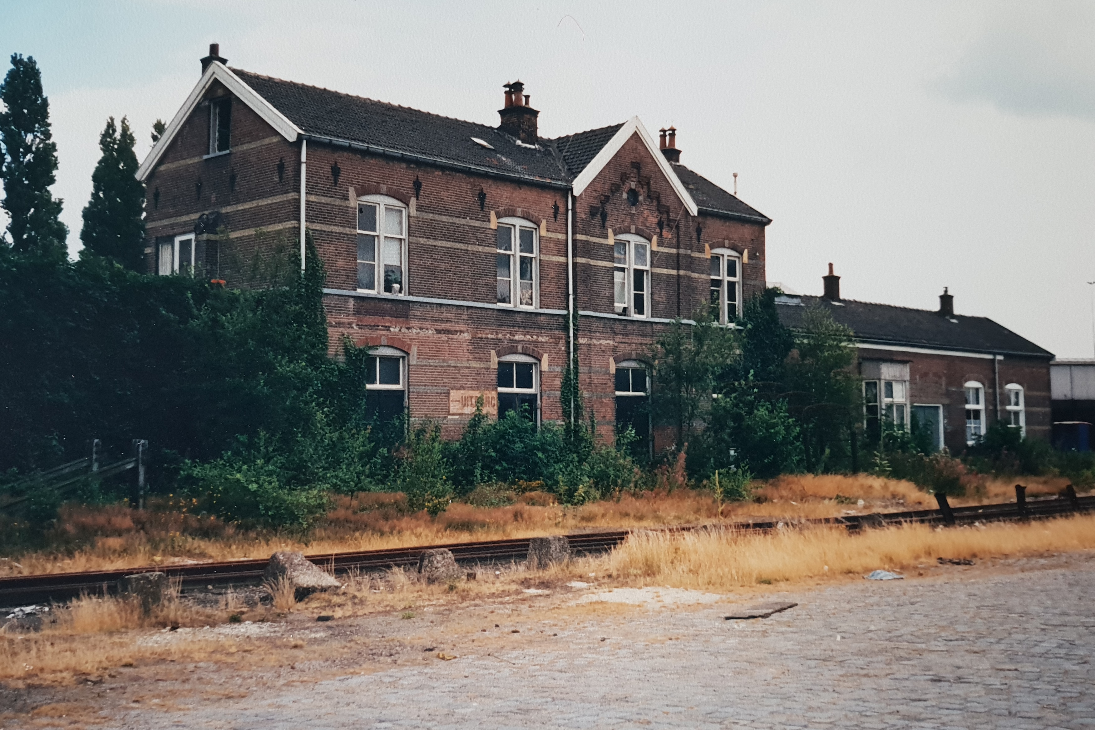 Station Enschede Noord in 1989 (foto: Daniel van der Ree)